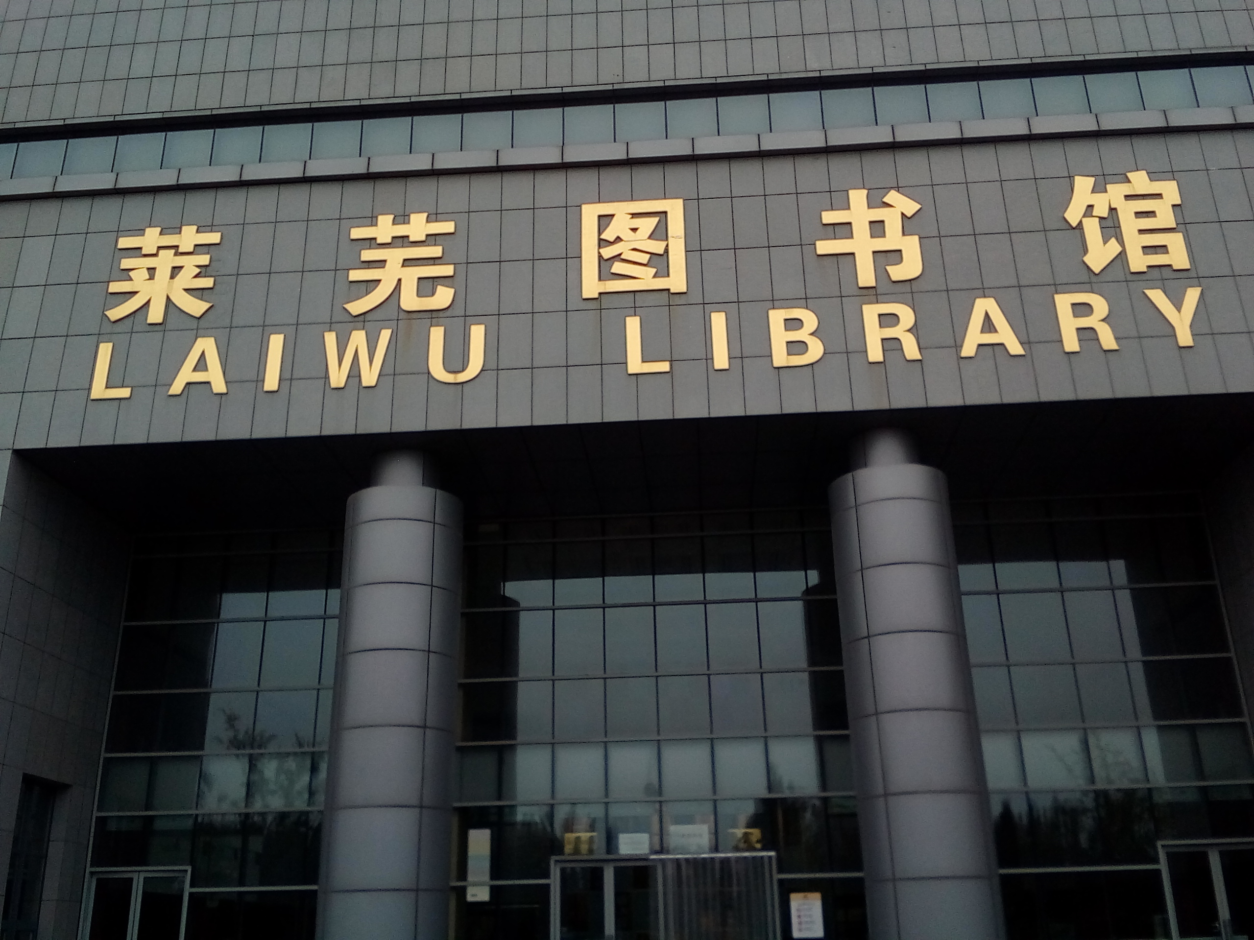 莱芜图书馆